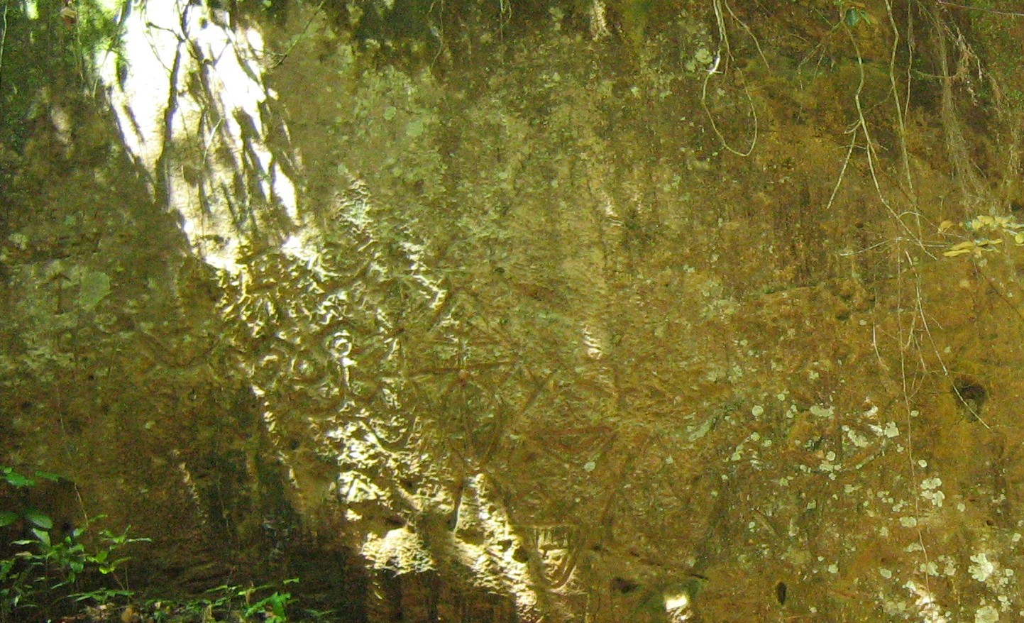 Peña donde están grabadas en bajorrelieve los petroglifos indígenas zenúes